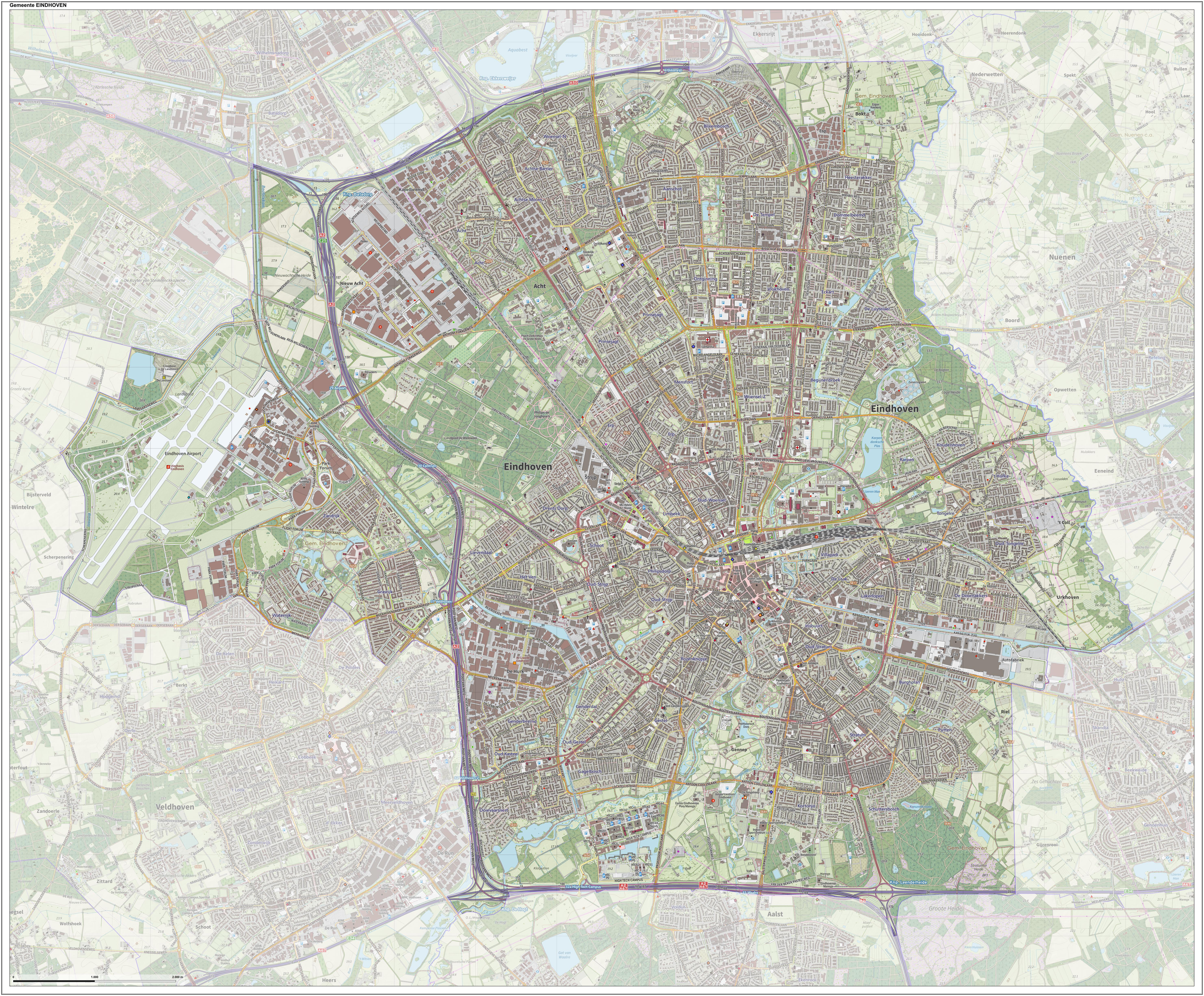 Topografische gemeentekaart. Resolutie: 400 pixels/km. Kaartbeeld samengesteld uit de open geodata van de Top10NL en Top25namen Basisregistratie Topografie, Creative Commons BY licentie. Gebouwvlakken uit open geodata BAG extract. Wegen uit de OpenStreetMap, OpenStreetMap community. Schaduwreliëf uit de Actuele Hoogtekaart AHN2. Samenstelling en kleurenschema: Jan-Willem van Aalst, met QGIS2. Zie ook de Legenda.